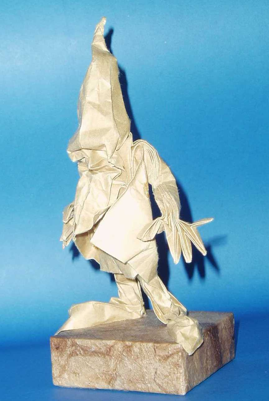 הגמד הראשון שאריק ג'ואזל קיפל